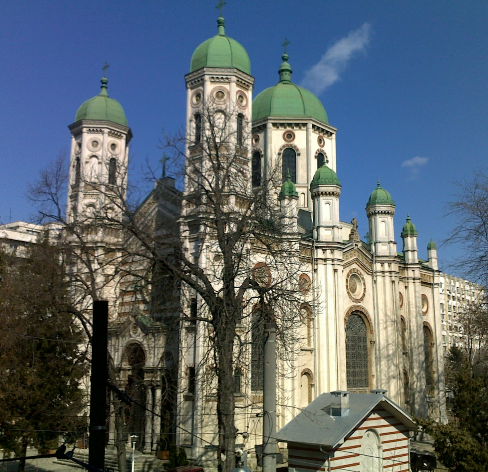 Biserica Sf. Spiridon Nou, Bucharest